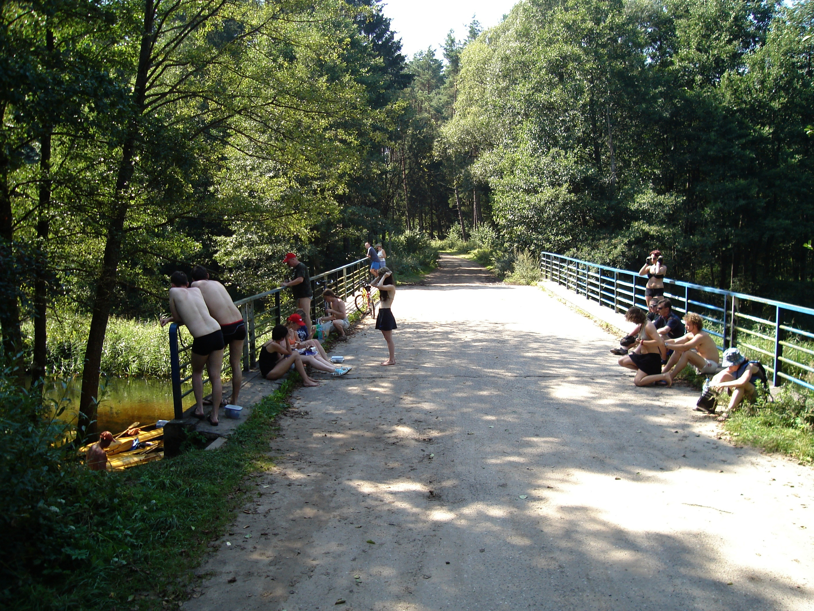 Most na Rospudzie, dolina Rospudy